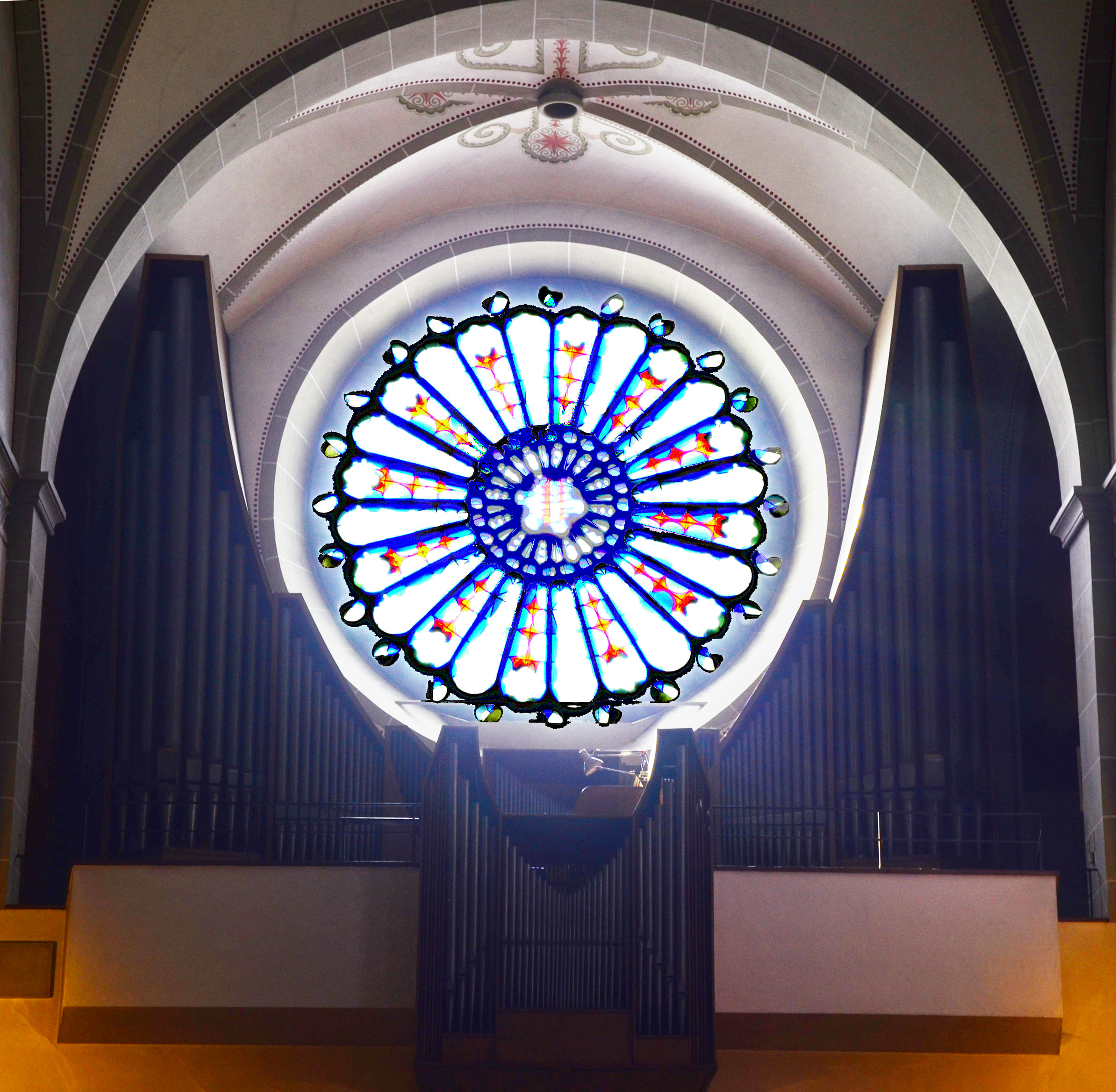 Denkmalgeschützte Basilika Mariä Heimsuchung (Werl), die Orgel